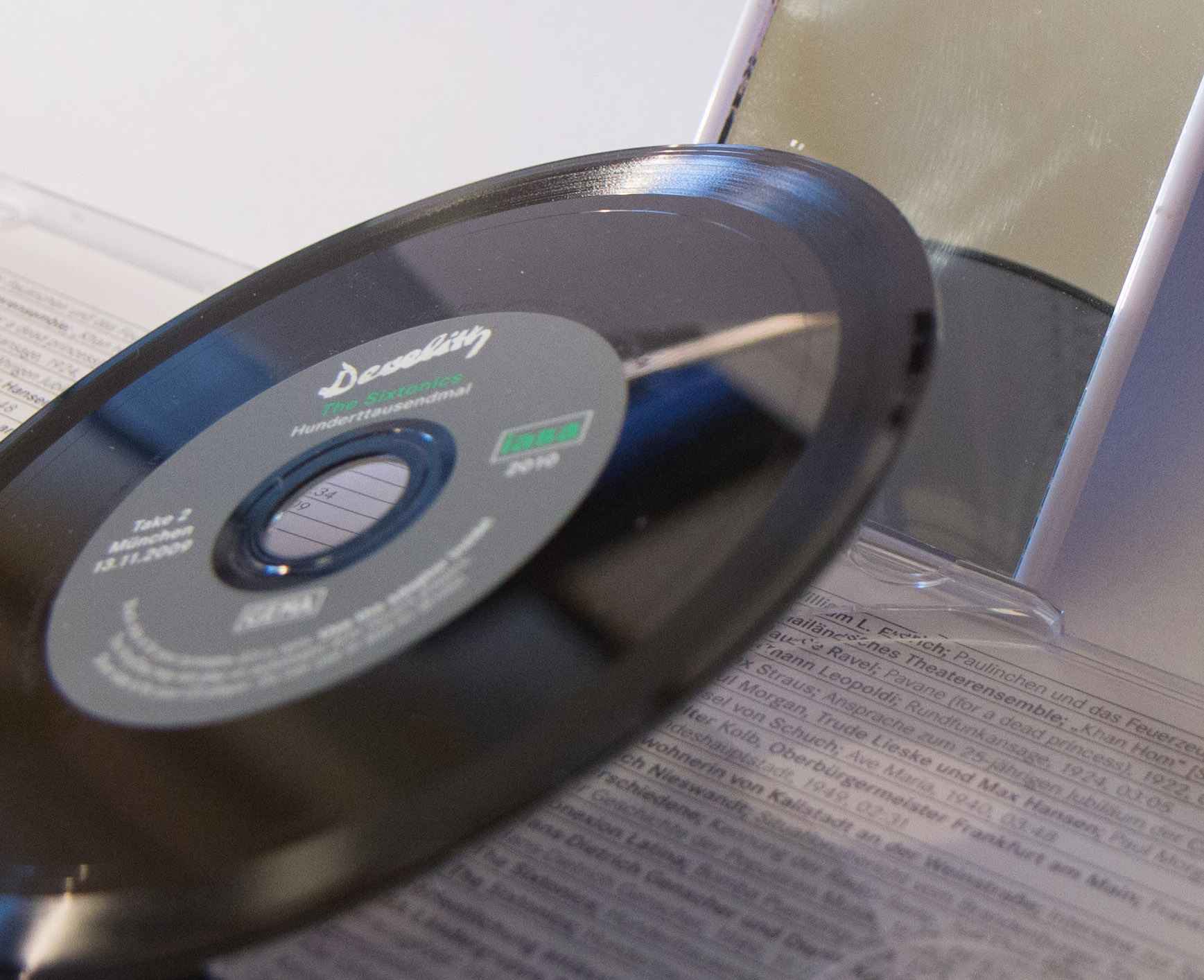 VinylDisc